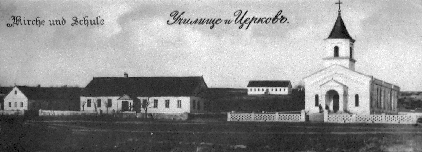 Hoffnungstal in Bessarabien